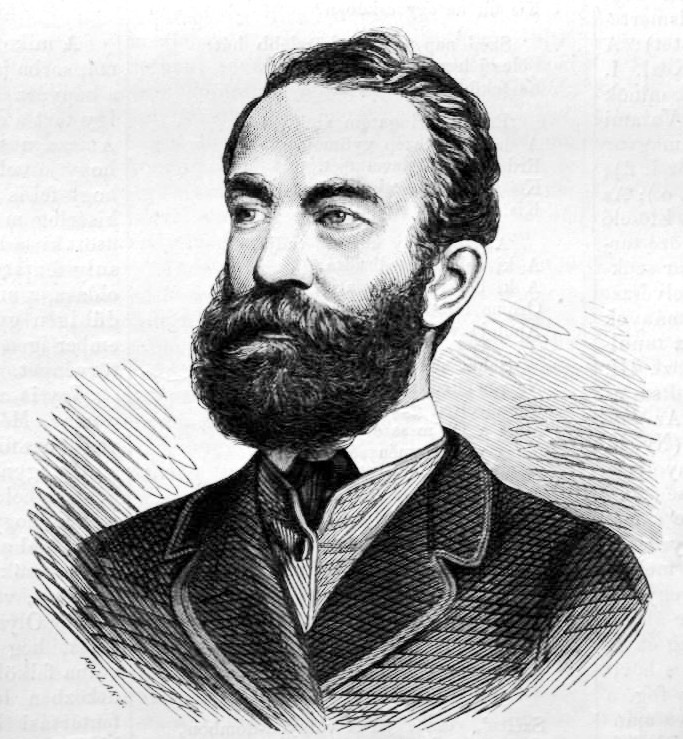 Budenz József (1836–1892) német születésű magyar nyelvtudós, a Magyar Tudományos Akadémia tagja portréja. Pollák Zsigmond metszete